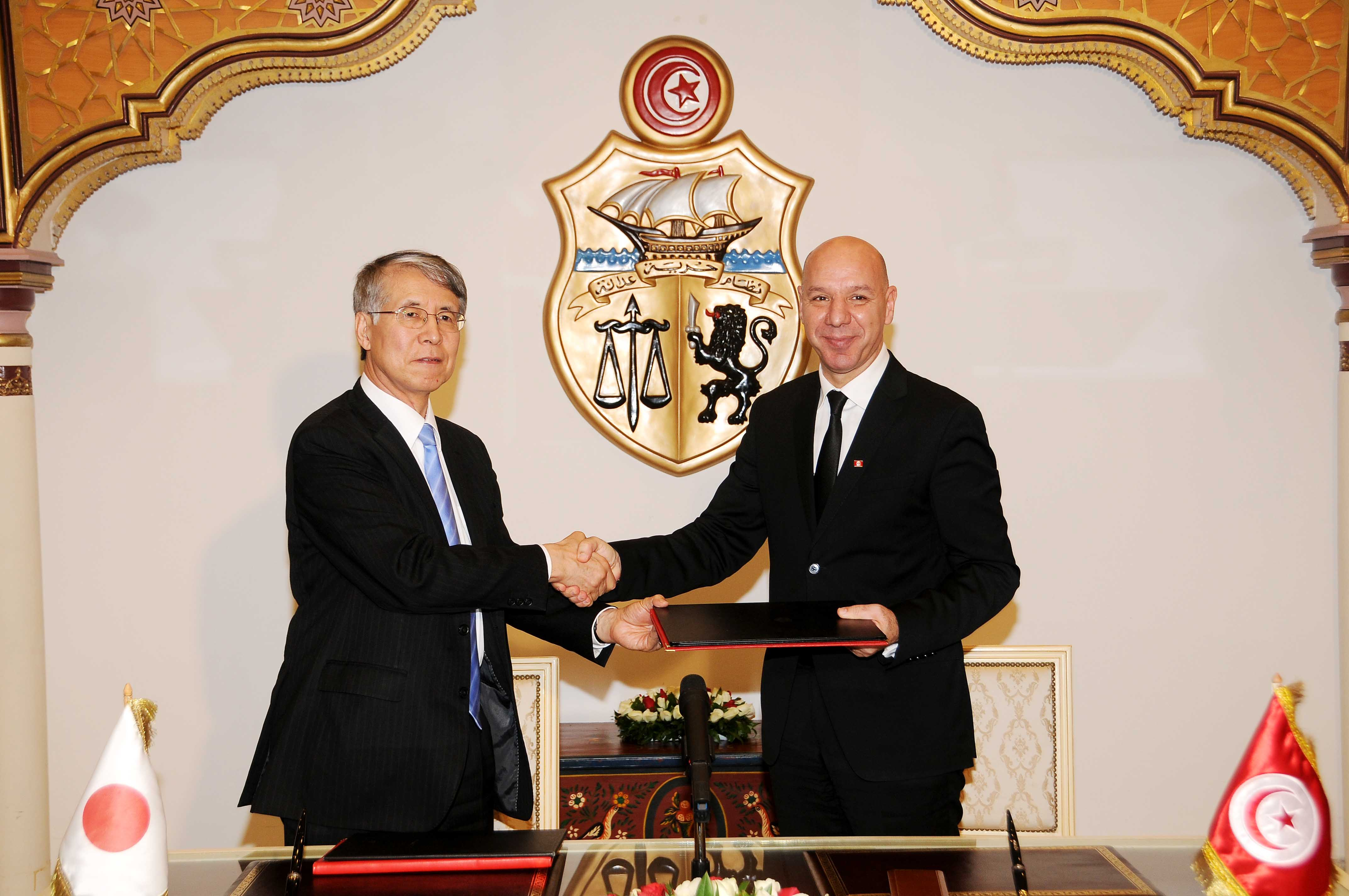 L’accord de prêt a été signé à Tunis par MM. Hédi Ben Abbes, secrétaire d’Etat aux Affaires étrangères chargé de l’Amérique et de l’Asie, et Toshiyuki Taga, ambassadeur du Japon en Tunisie.